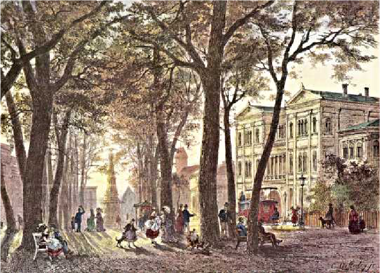 Palmaille mit - von rechts nach links - Bahnhof (seit 1898 Rathaus Altona), Turm der Christianskirche (Ottensen) und Siegessäule (Altona))